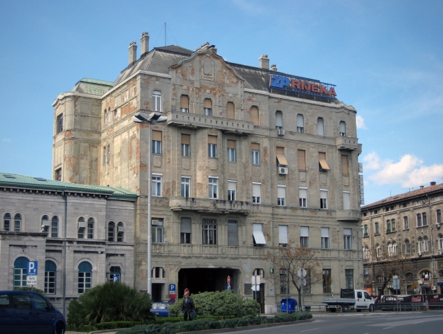 Palača direkcije željeznica, Rijeka